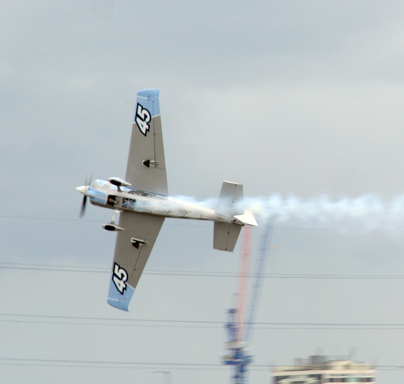 Glen Dell